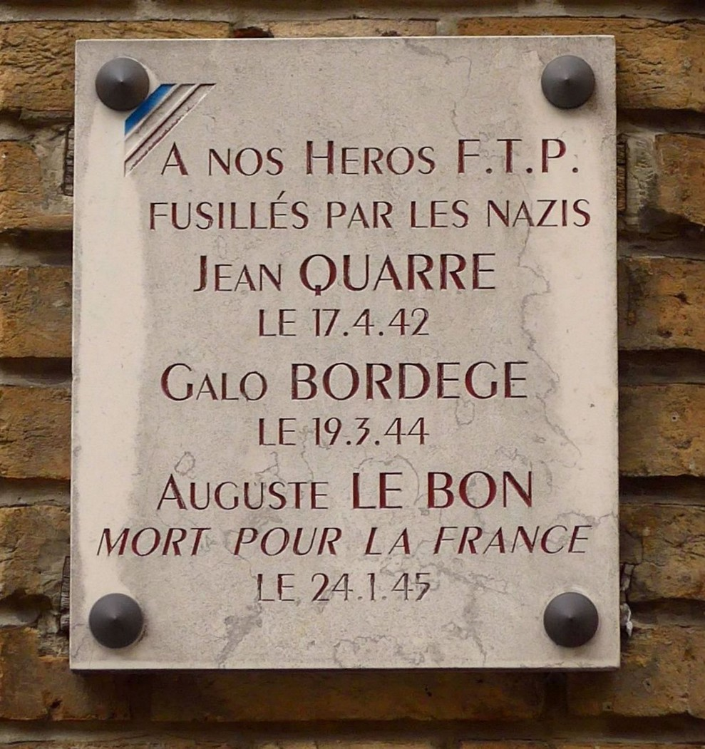 Plaque commémorative Jean QUARRE Galo BORDEGE Auguste LE BON, 27 rue Docteur-Potain, Paris 19e